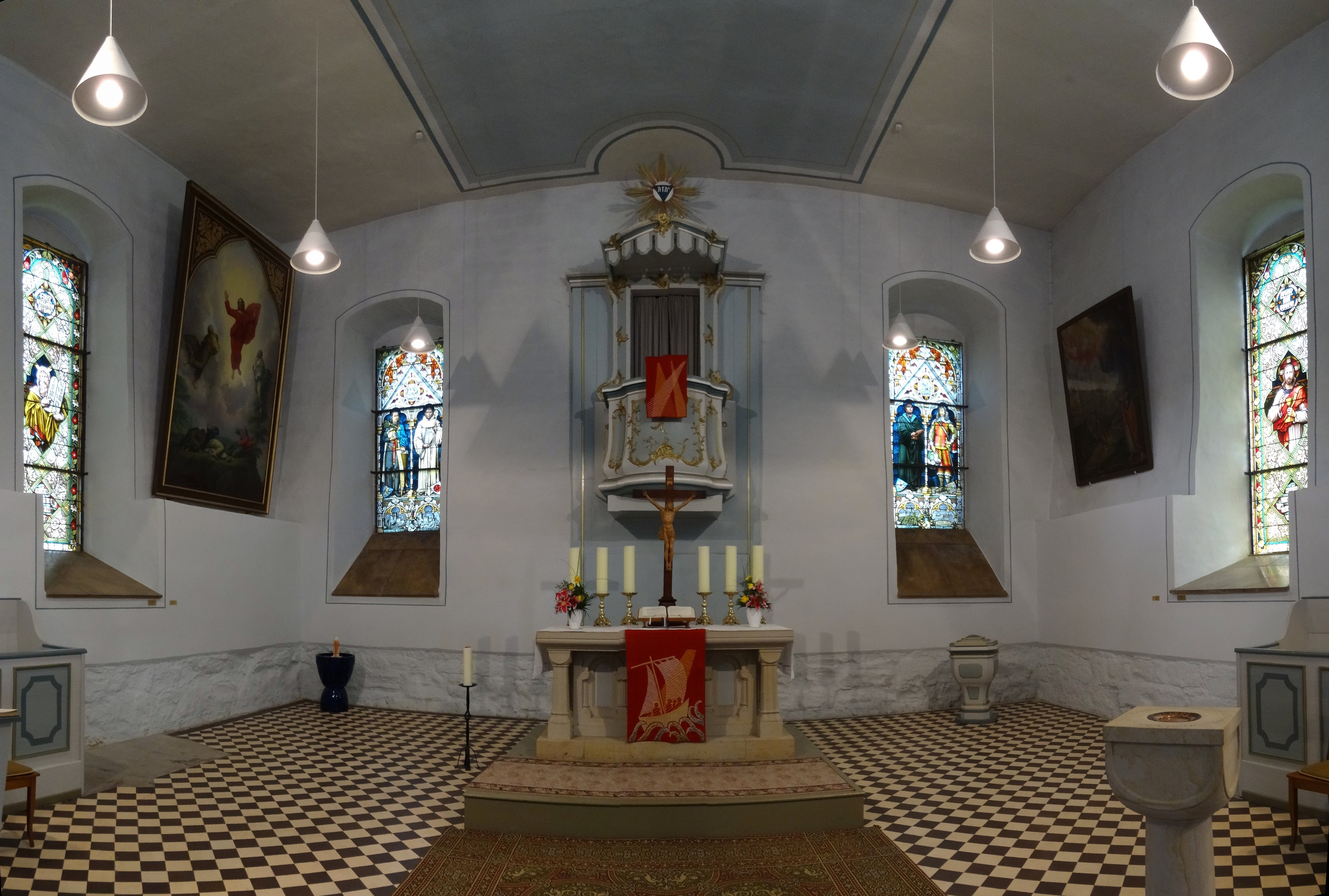 Altarraum der Sankt Elisabethkirche Georgenthal. Farbige Glasfenster von Wilhelm Francke mit Motiven aus der Georgenthaler Geschichte. Sie zeigen Graf Sizzo III. von Käfernburg, den Klosterstifter, den Gründungsabt Graf Eberhard von Berg, Martin Luther und Herzog Ernst den Frommen.